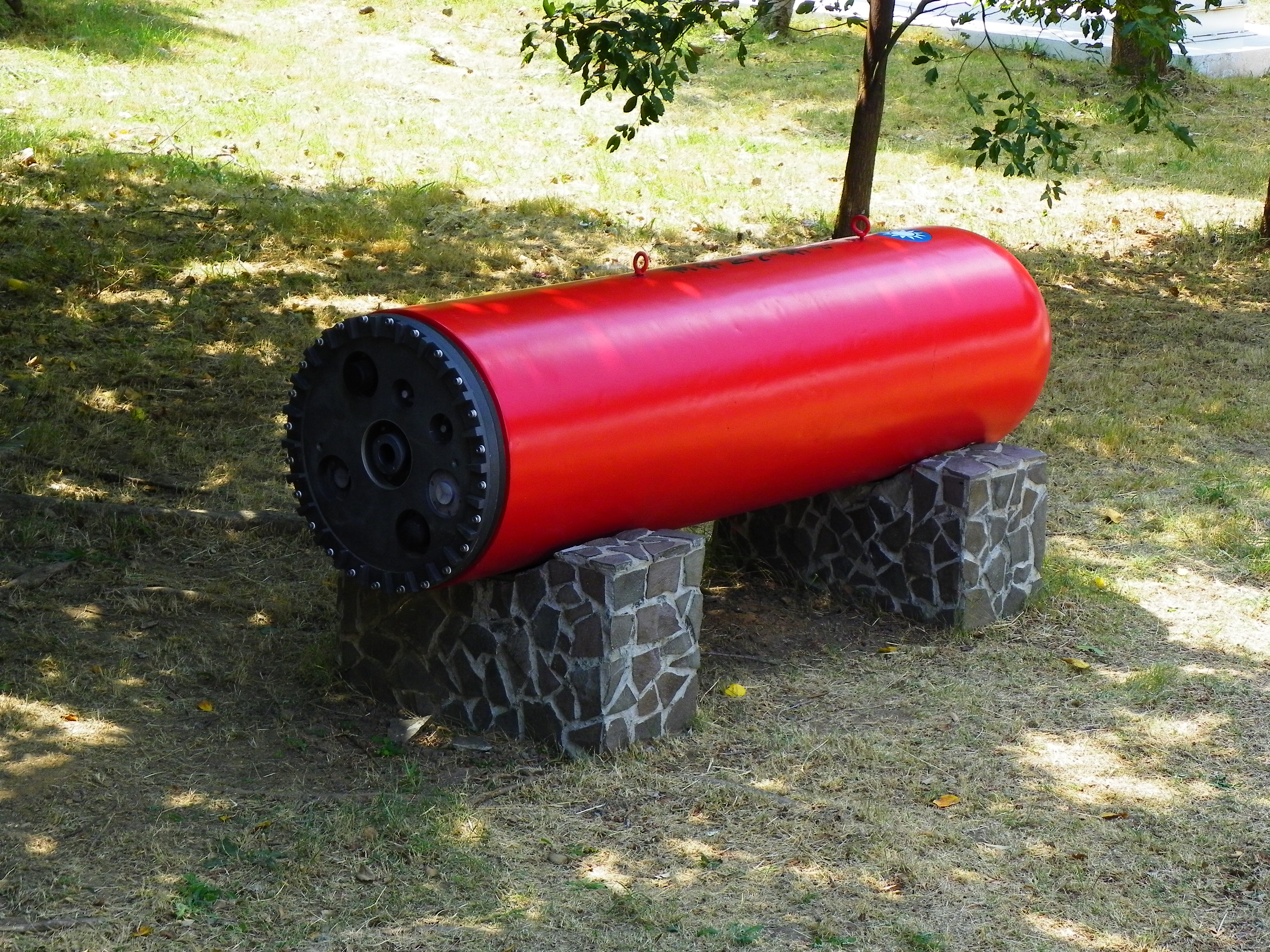 中文（台灣）: 成功嶺展示的海軍萬象二號沉底雷右後方。